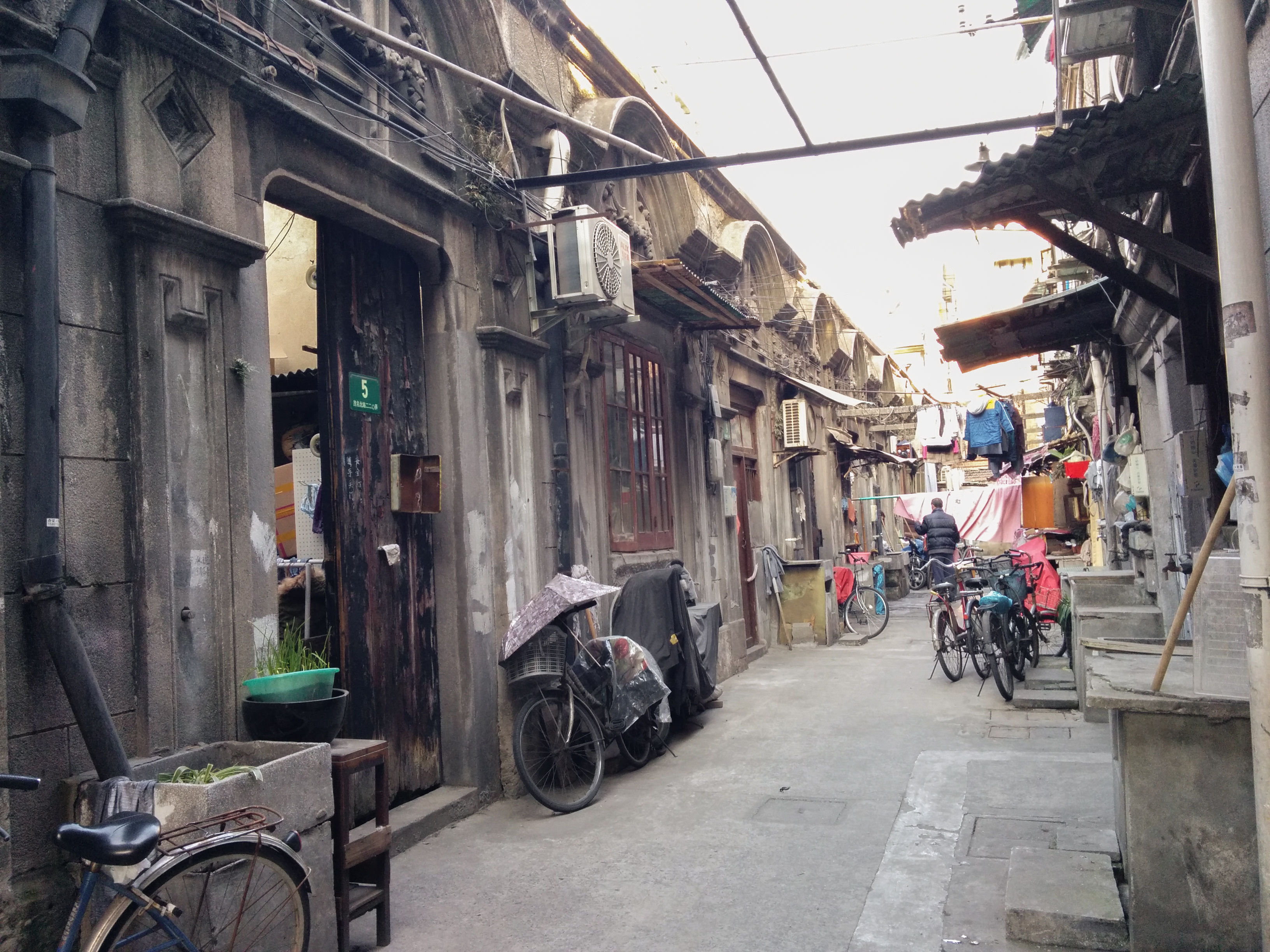 中文（中国大陆）: 震兴里的一条弄堂静安区茂名北路192—220弄 震兴里 旧式里弄 1927年 砖木二层